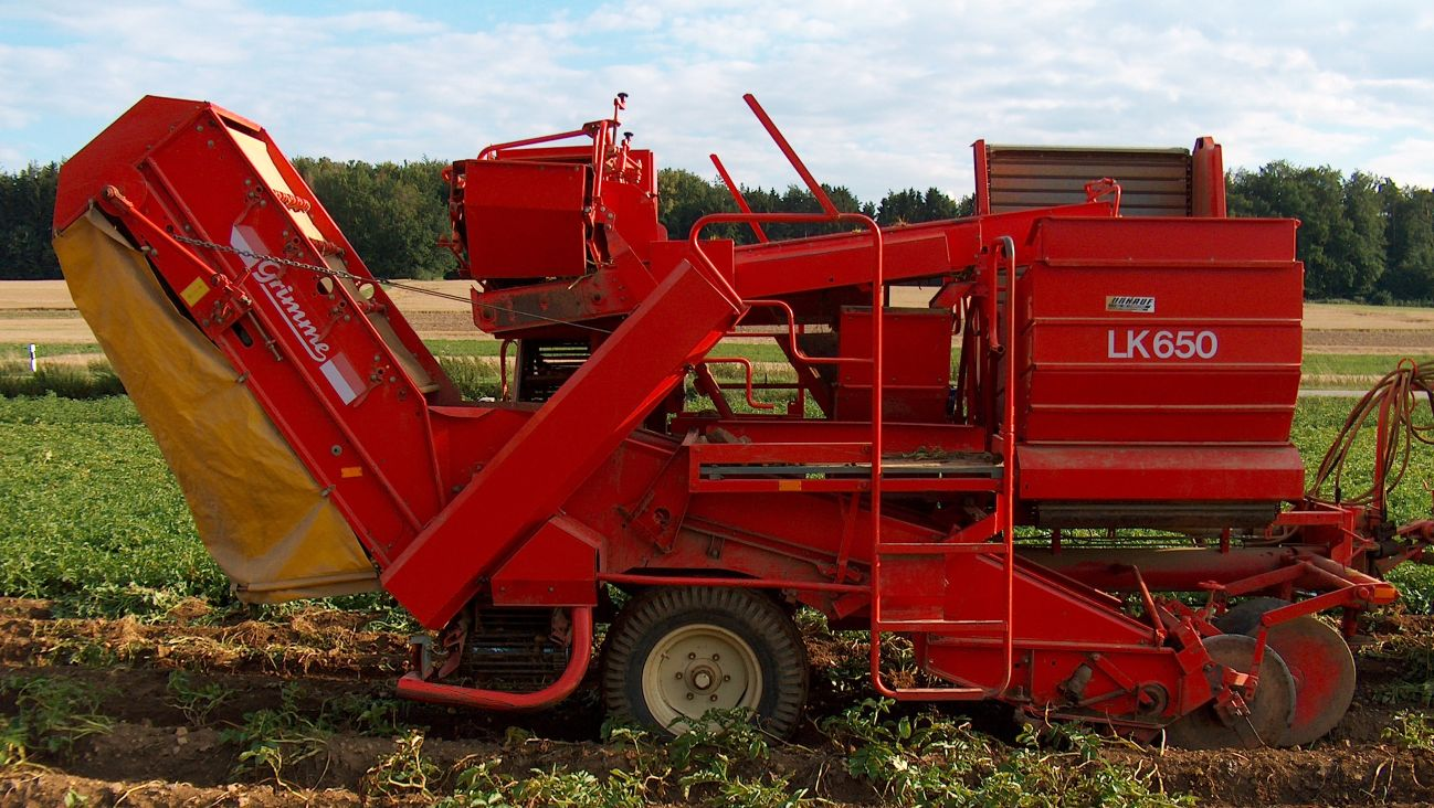 Einreihiger Kartoffelvollernter mit Bunker, Grimme LK 650, Baujahr 1988